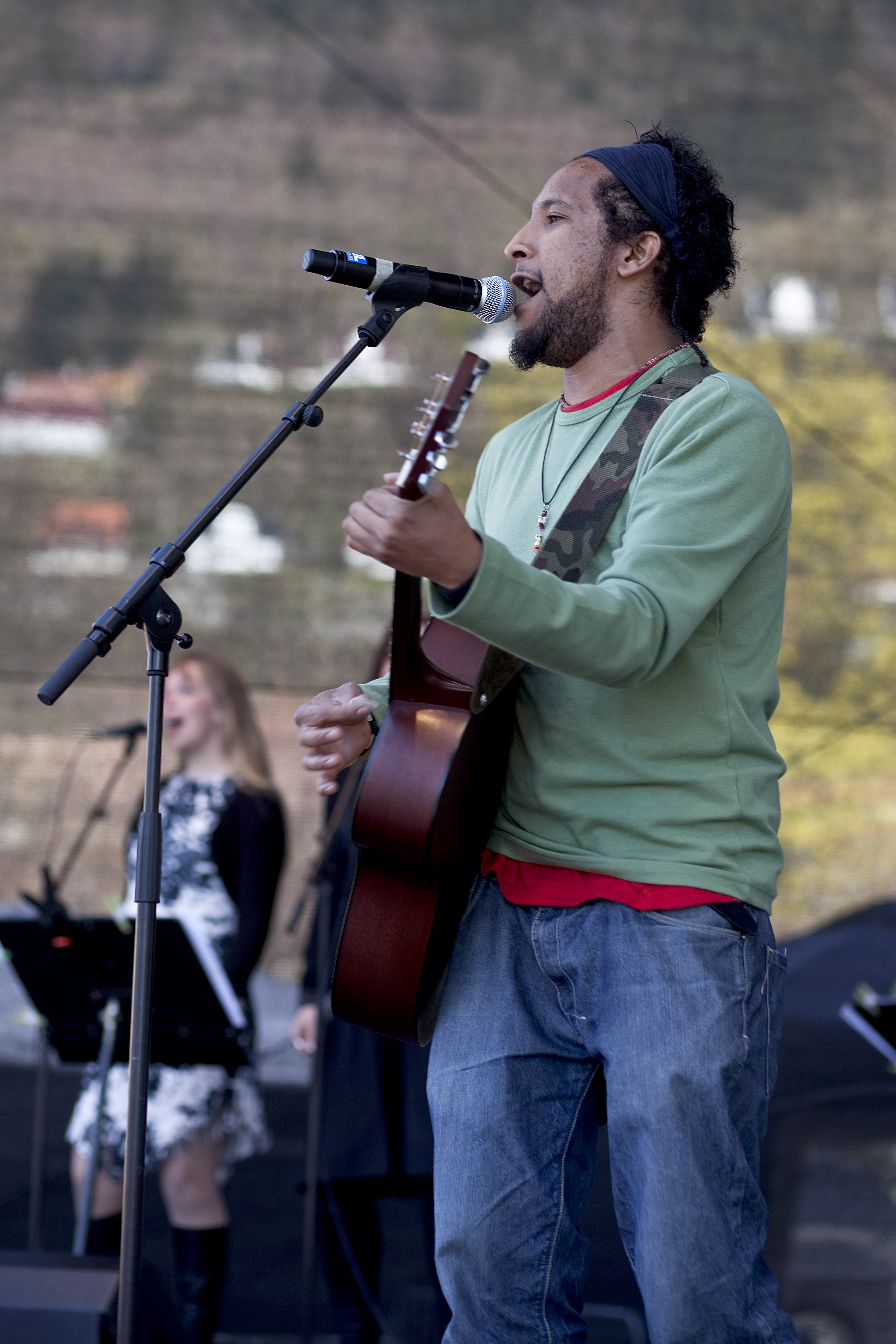 Stig Van Eijk. FOTO: Jarle H. Moe